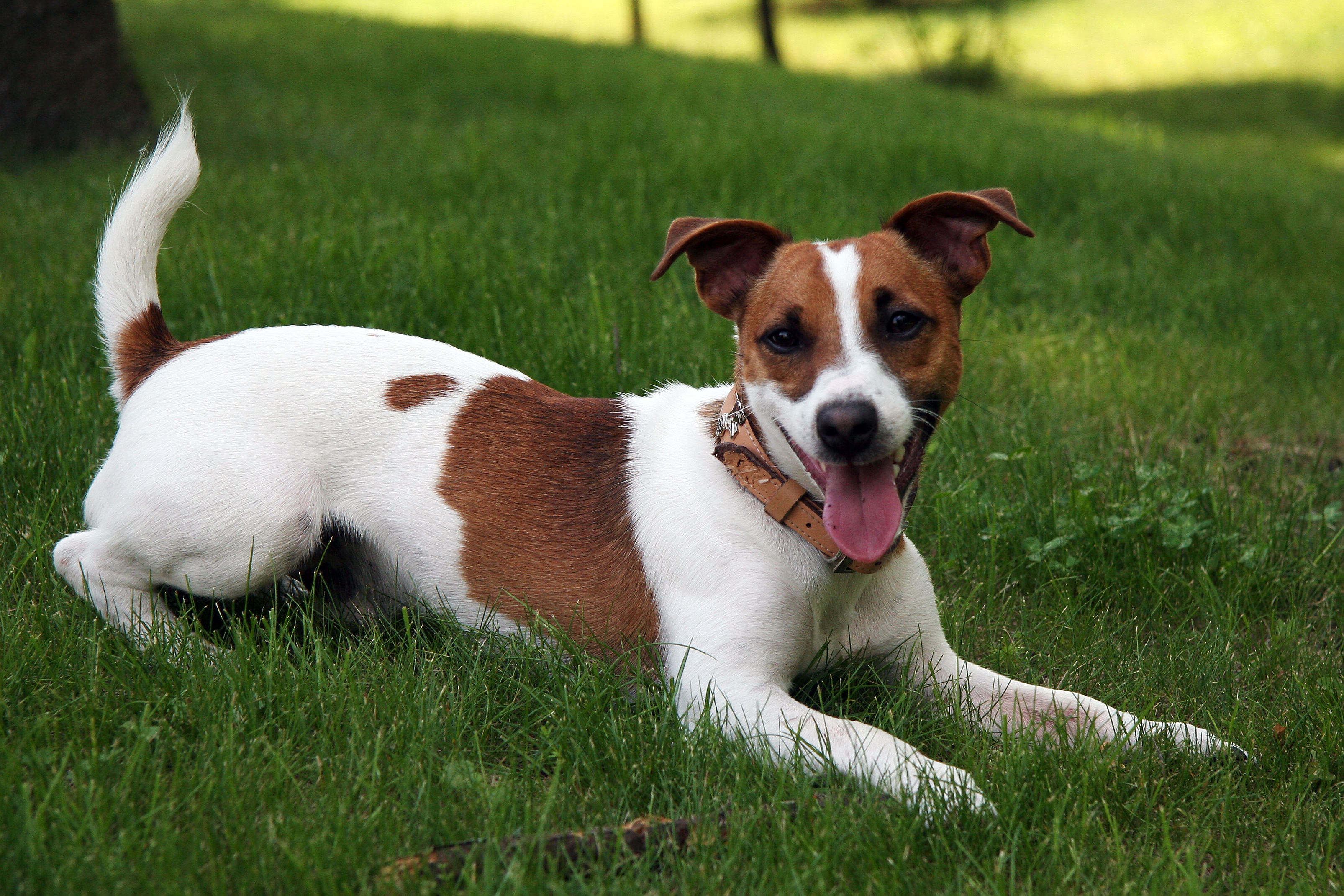 Jack Russell Terrier